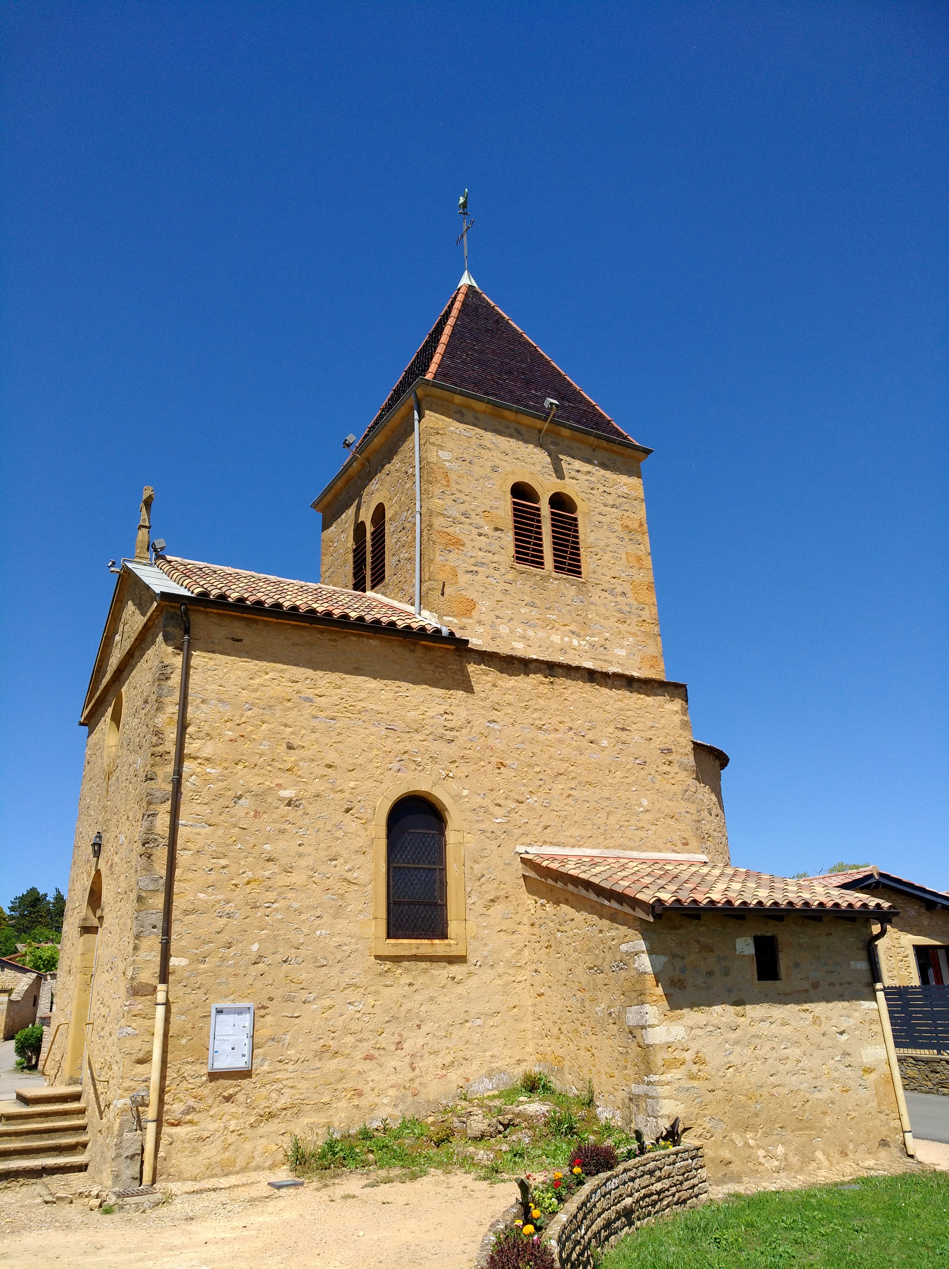 Église de Saint-Jean-des-Vignes, dans le département du Rhône (France).